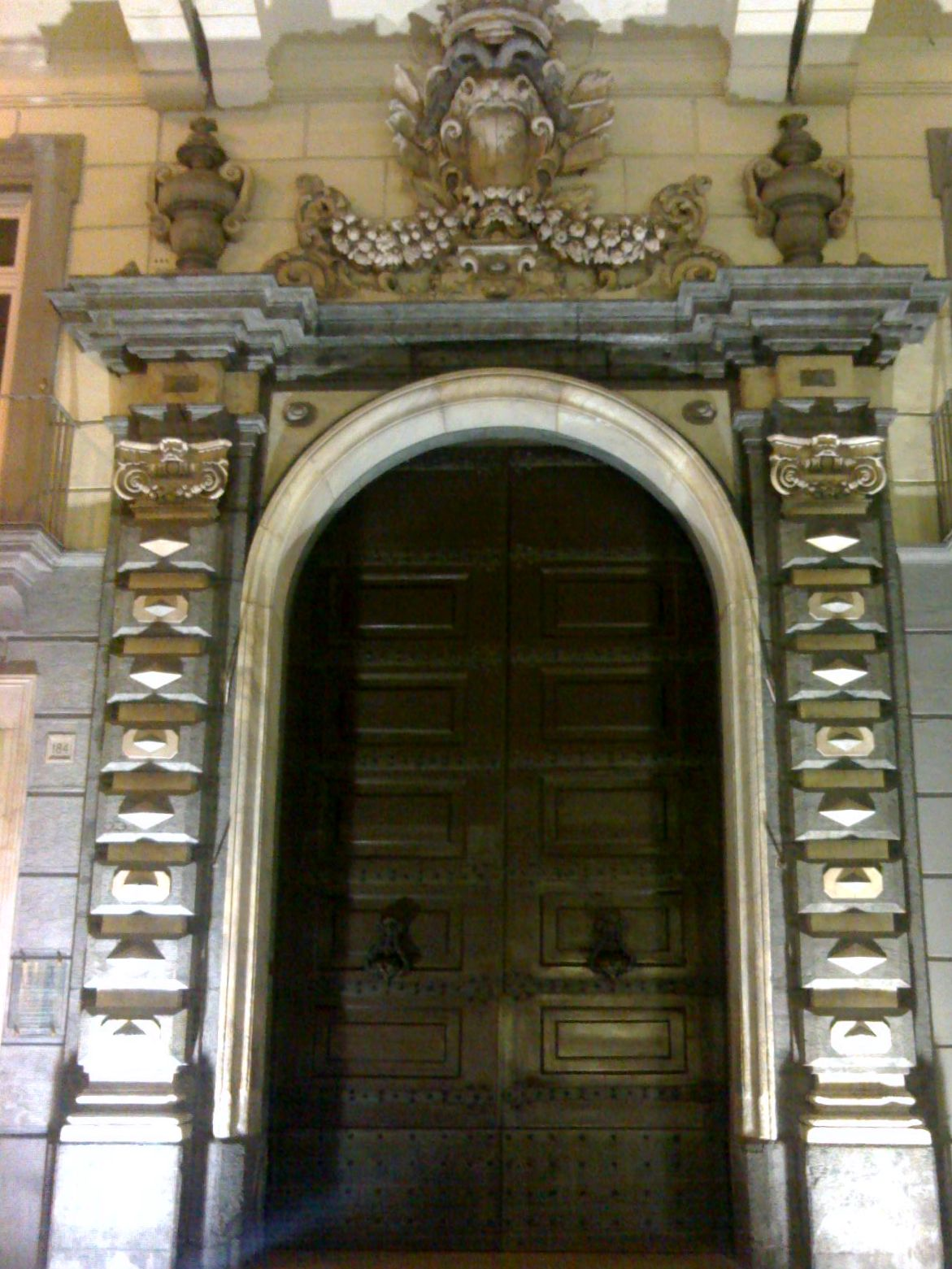 Portone monumentale del Palazzo Zevallos di Napoli. Lo stemma tuttavia è della famiglia Colonna di Stigliano, succeduta alla prima e che ha dato all'edificio l'aspetto che tutt'oggi ha.